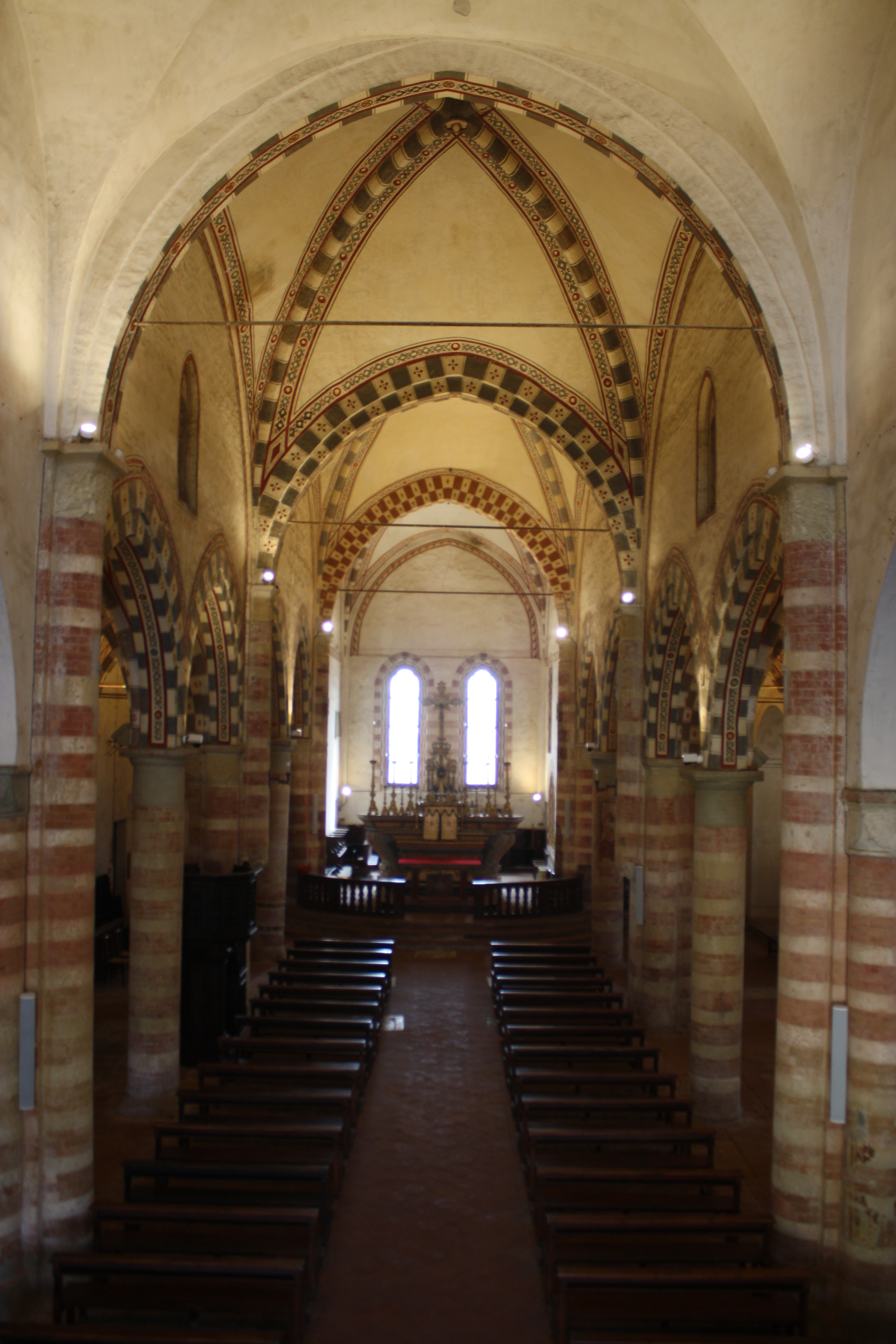 Chiesa di San Francesco a Cassine This is a photo of a monument which is part of cultural heritage of Italy.